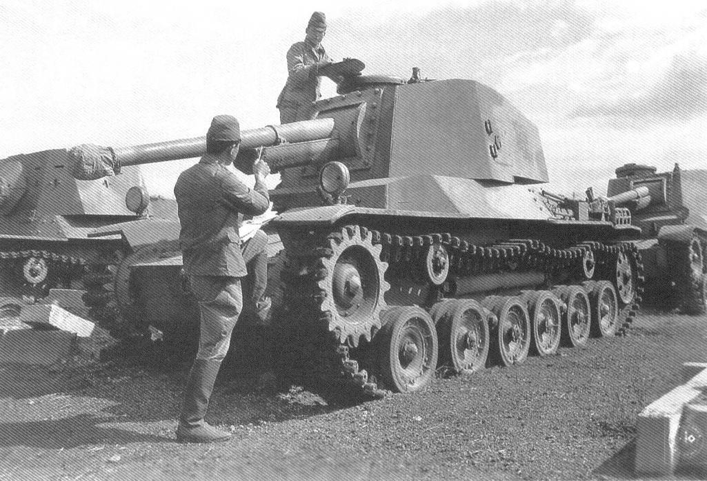 Type 3 Chi-Nu tank during maintenance, in Hakata, Fukuoka